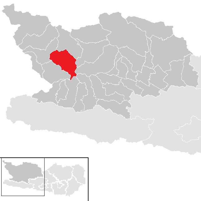 Bezirk Spittal an der Drau